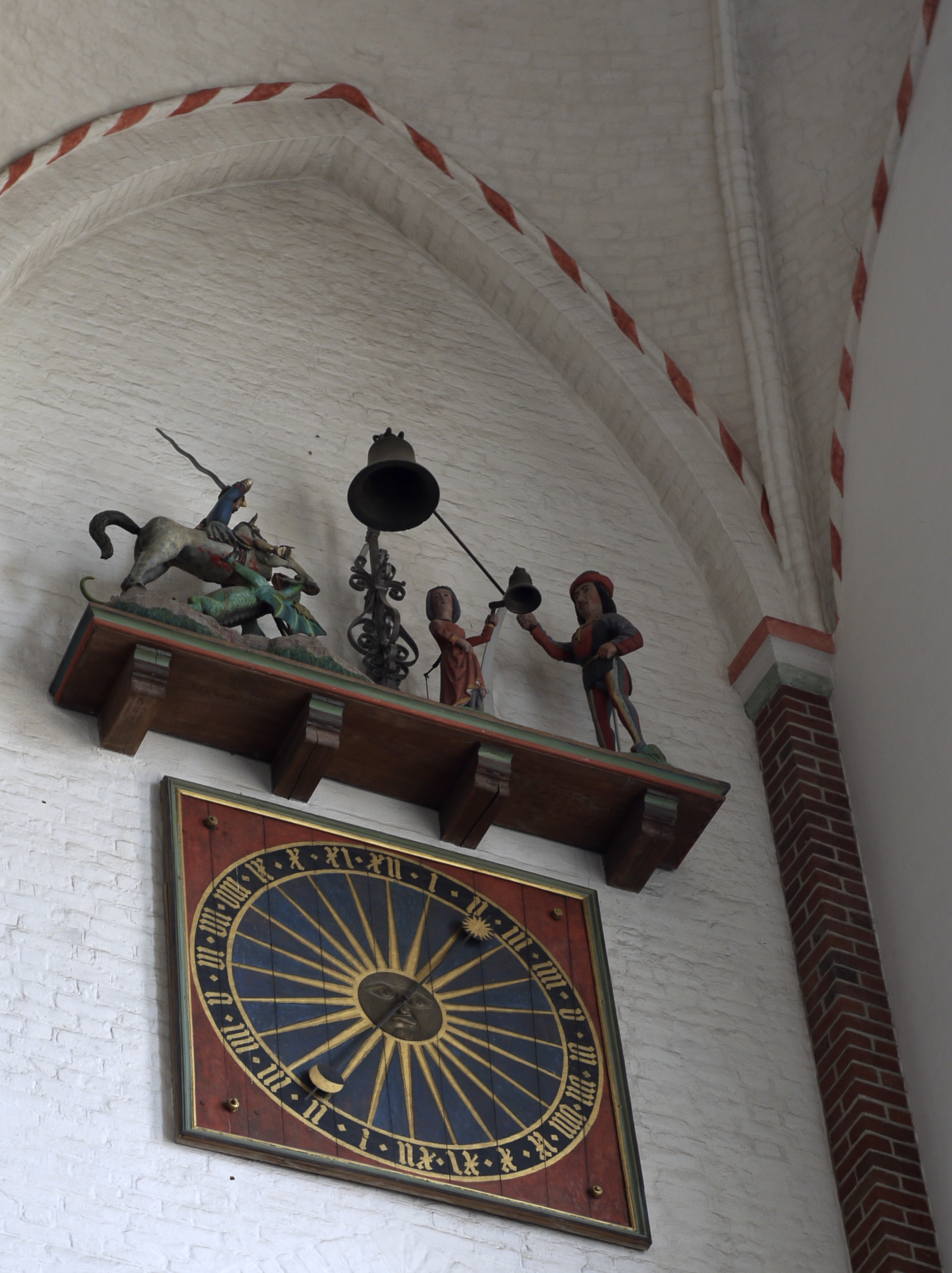 Kirsten Kimers, Per Døver og St. Jørgen med dragen i Roskilde Domkirke Roskilde, Denmark, shot with a Panasonic Lumix G1 equipped with a Voightlander Nokton 40mm Leica M-mount lens.